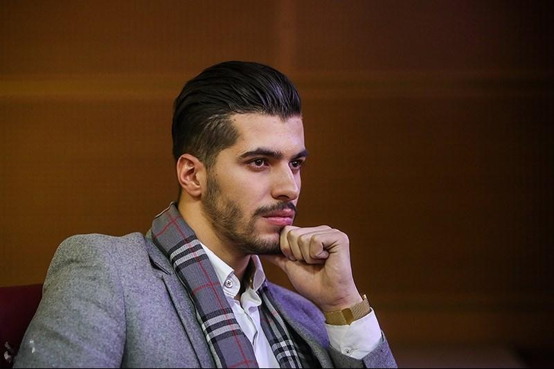 فجر ۳۵ - نشست خبری فیلم فِراری - نشست خبری فیلم فِراری به کارگردانی علیرضا داوودنژاد در چهارمین روز از سی‌و‌پنجمین جشنواره فیلم فجر‌ در‌ کاخ این جشنواره واقع در برج میلاد تهران برگزار شد. Template:3n